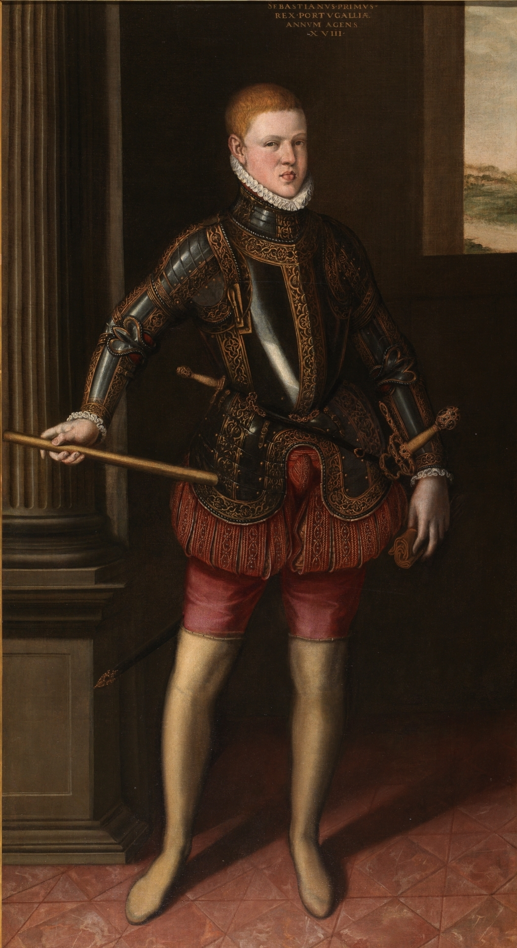 Retrato juvenil del rey Sebastián I de Portugal (1554-1578), que murió en la batalla de Alcazarquivir.